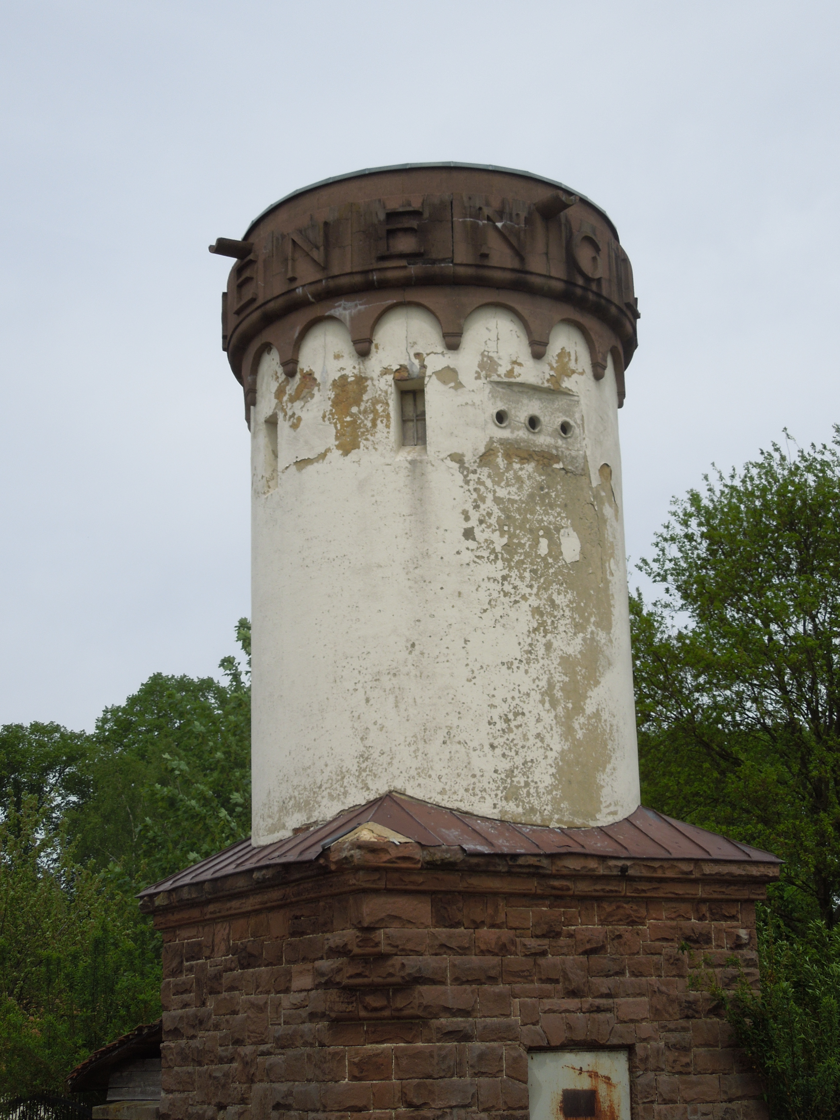 Die Trafostation von 1911 bei der Kalbsburg bei Borken-Großenenglis (mit Inschrift "Hohenenglys 1282"); möglicherweise auf der Grundlage der ehemaligen Landwehrwarte erbaut